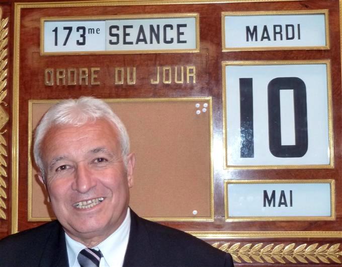 Paul Salen à l'Assemblée Nationale